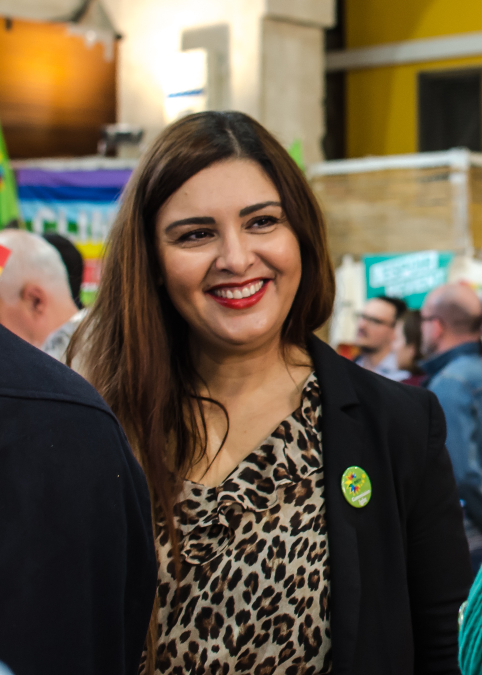 Salima Yenbou, députée européenne, à Paris le 6 avril 2019